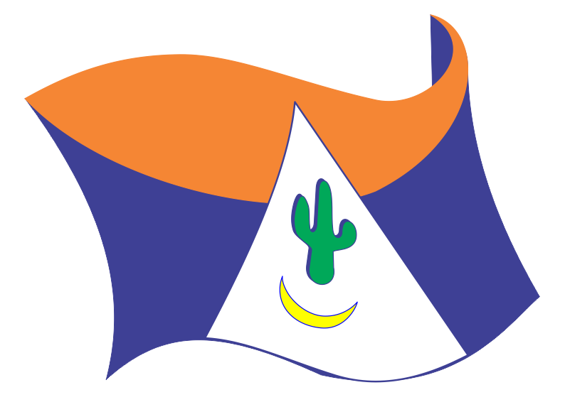 Bandeira do Município de Santa Maria da Boa Vista, Pernambuco